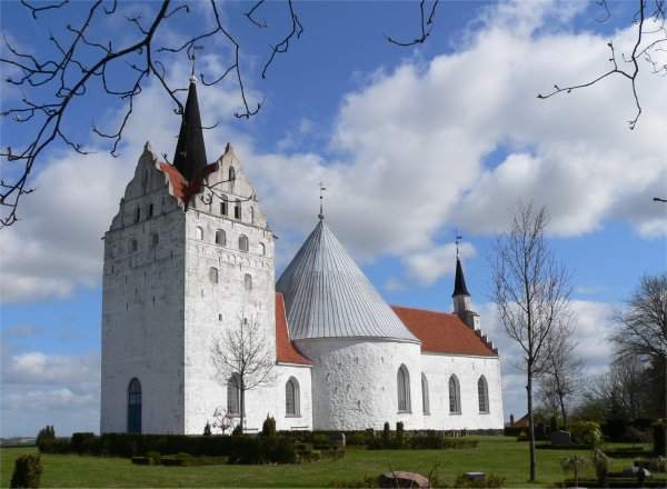 Horne Kirke, Denemarken